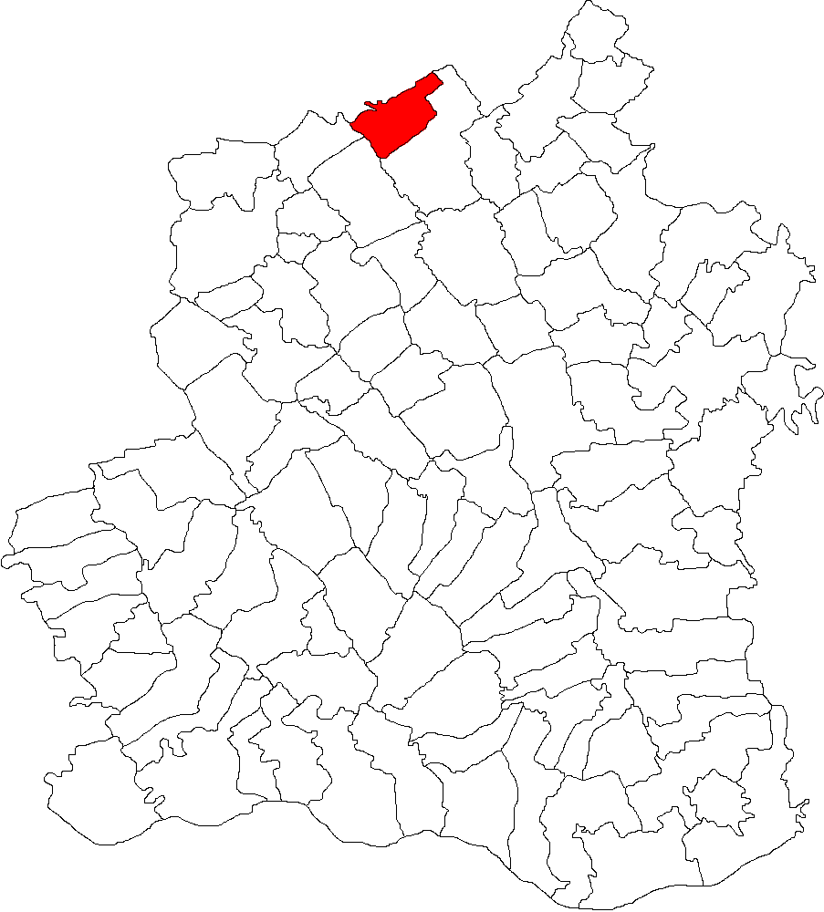 Categorie:Hărţi ale judeţului Teleorman